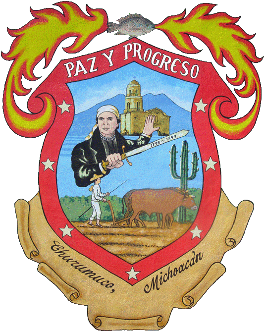 escudo de churumuco michoacan